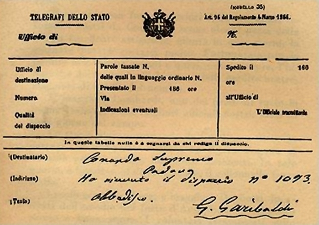 telegramma di Giuseppe Garibaldi, con il celebre e celebrato «obbedisco».